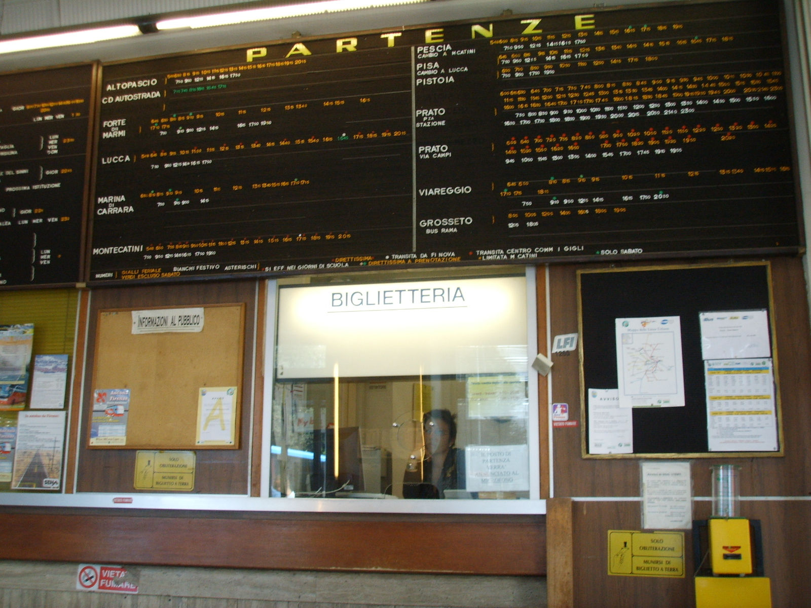 Biglietteria lazzi piazza adua in Florence